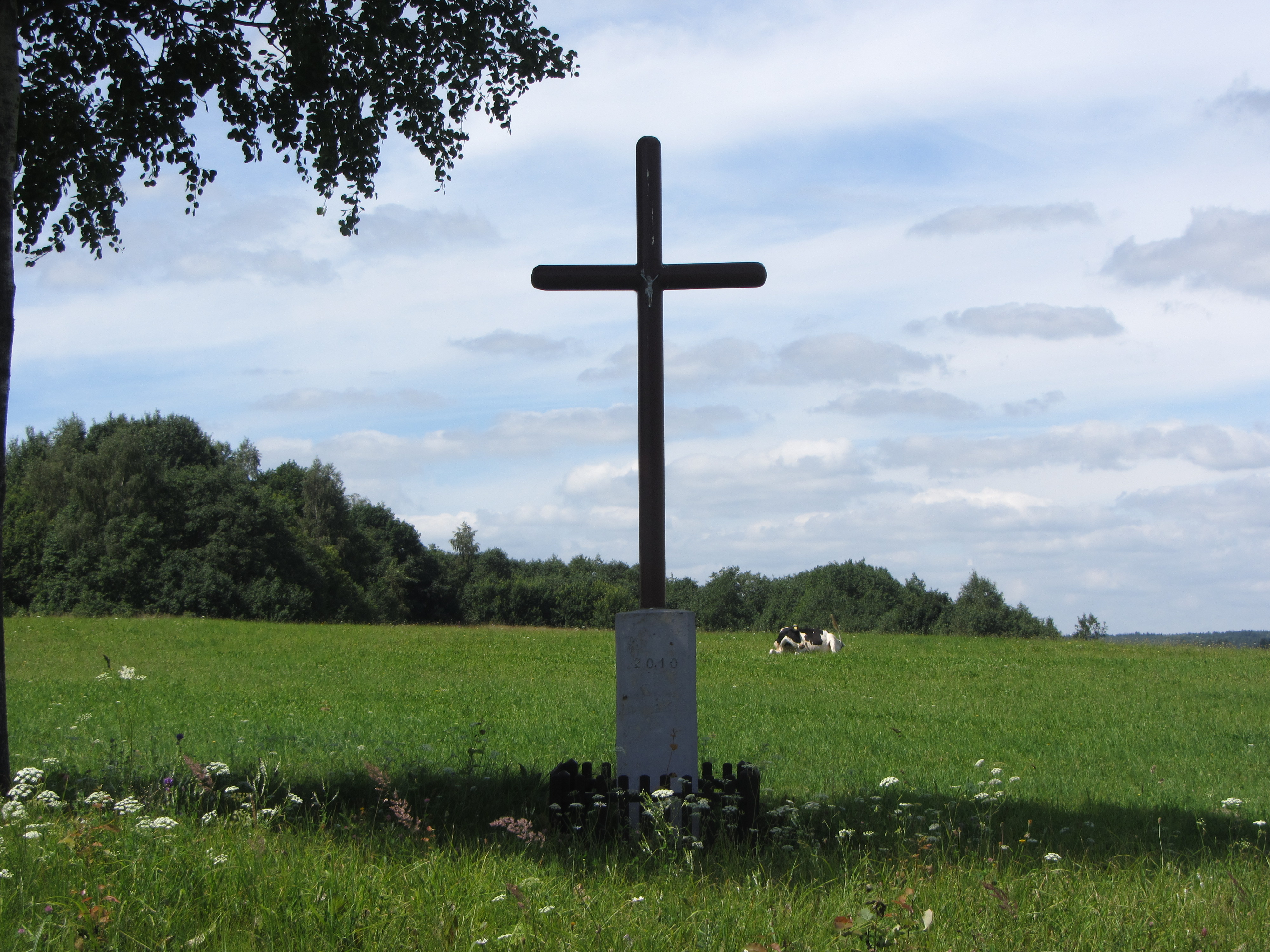 Inturkės sen., Lithuania